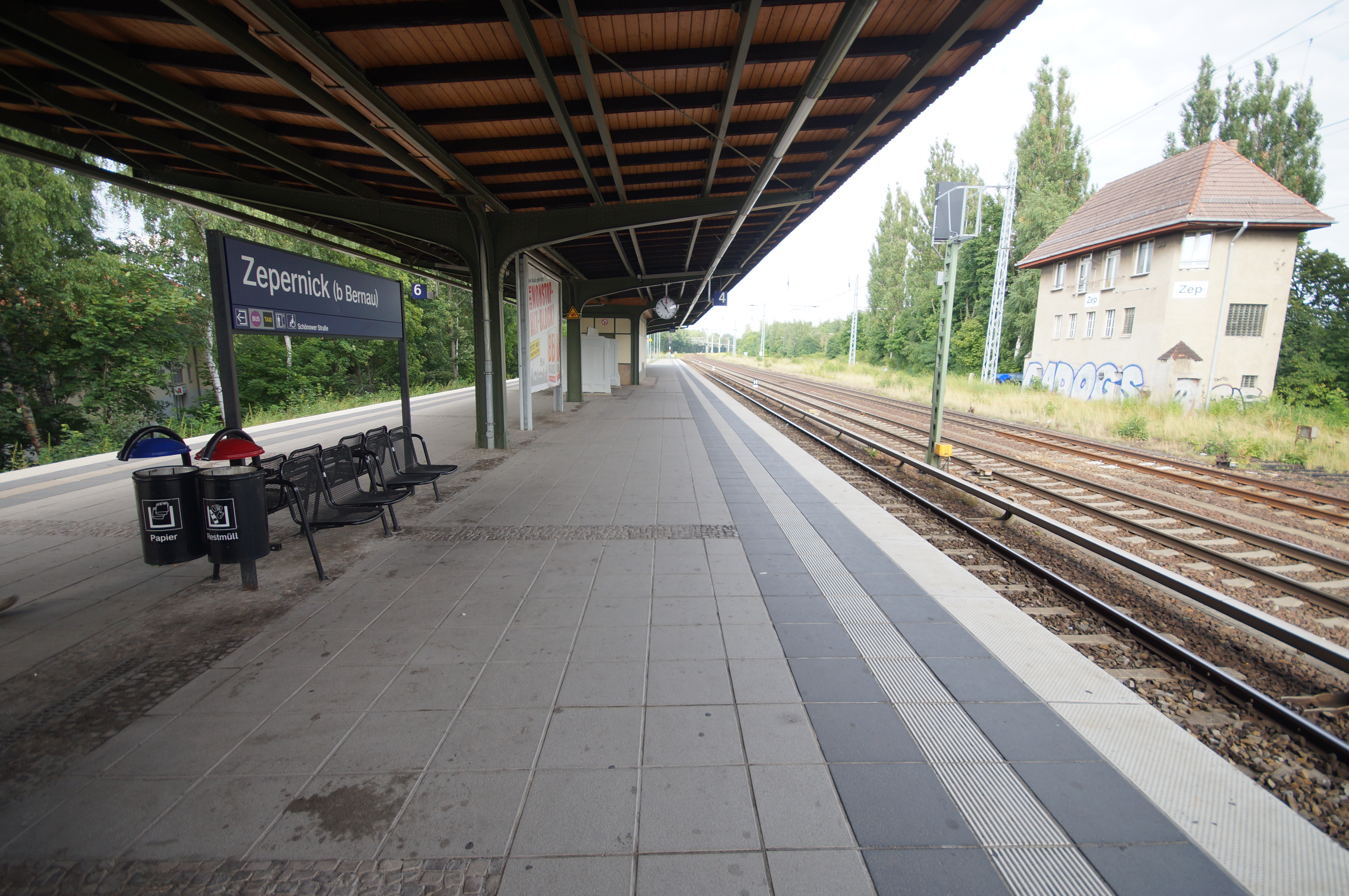 Bahnsteige des Bahnhofs Zepernick (b Bernau) in Panketal in Brandenburg bei Berlin